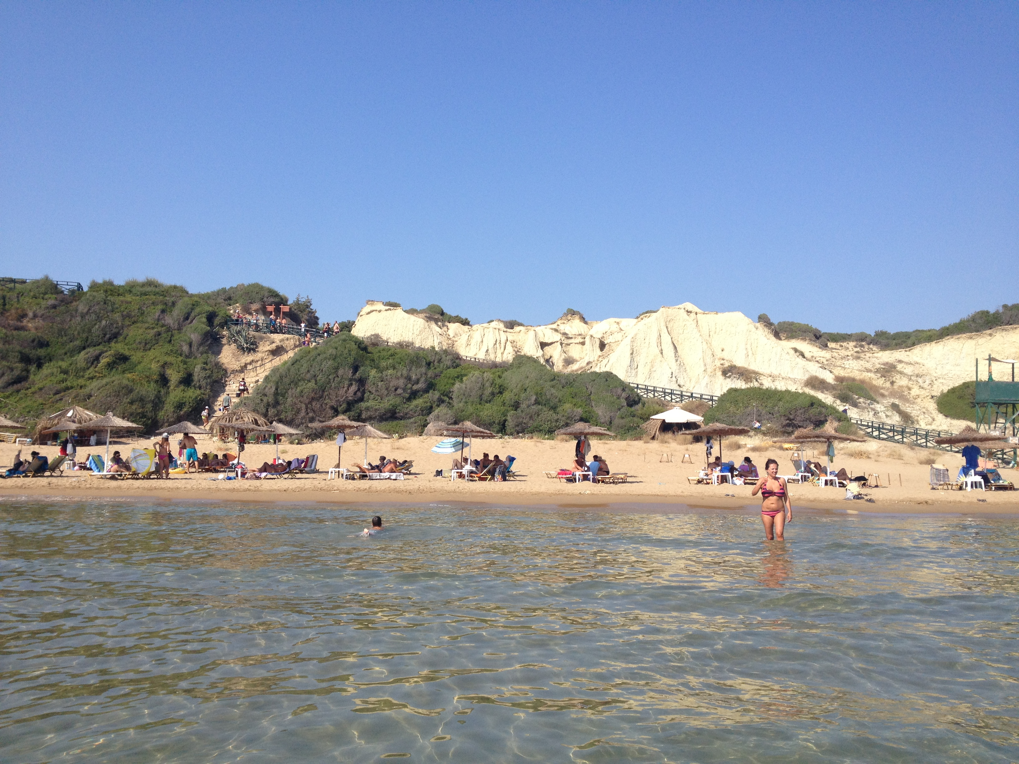 Vasilikos 291 00, Greece